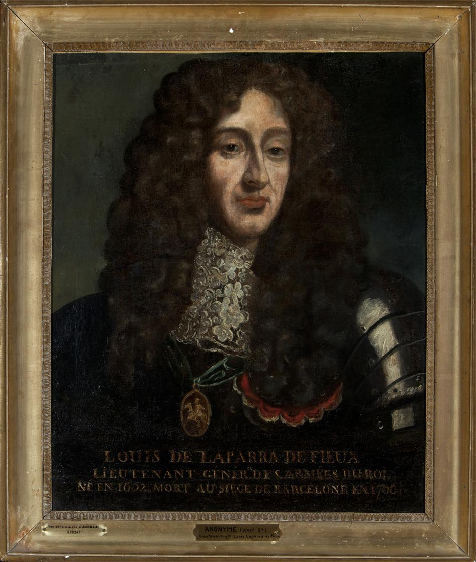 Dipinto del XVIII secolo conservato presso il museo d'Arte e Archeologia di Aurillac, Alvernia, Francia.